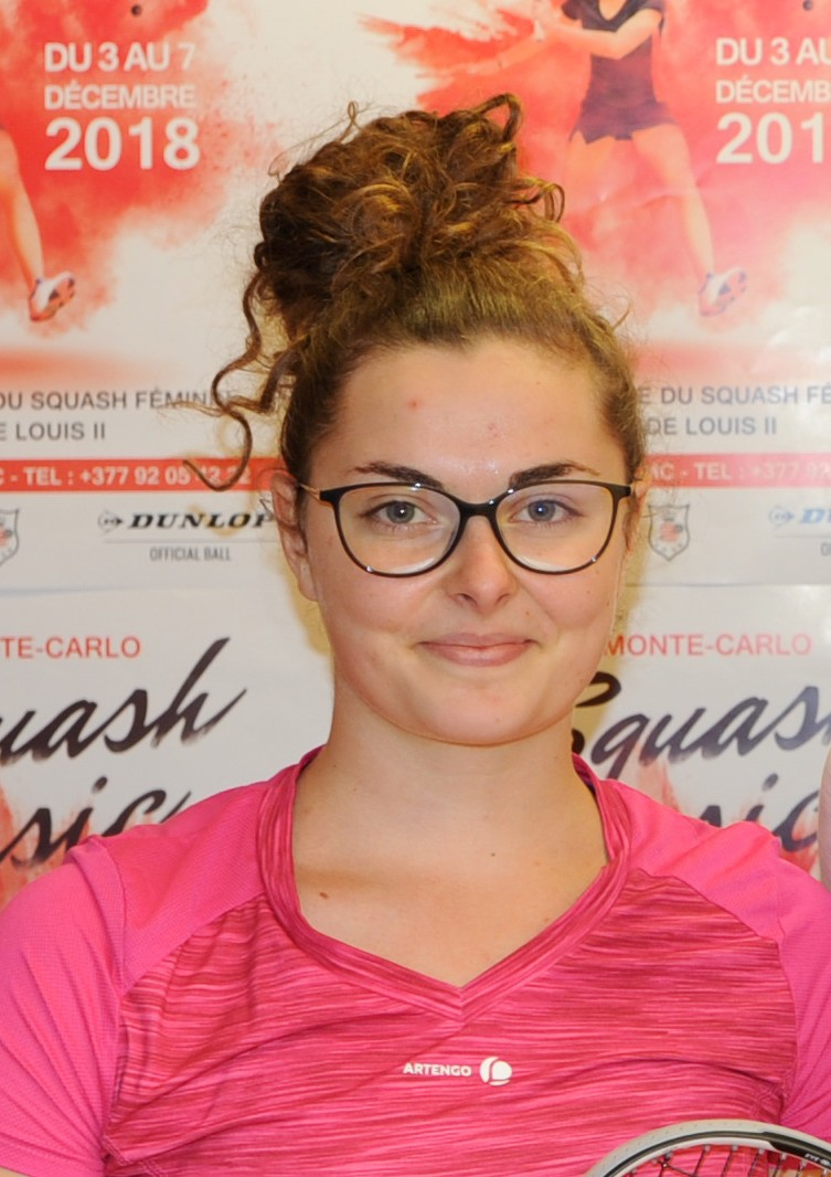 Fanny Segers , Monte-Carlo Squash Classic 2018